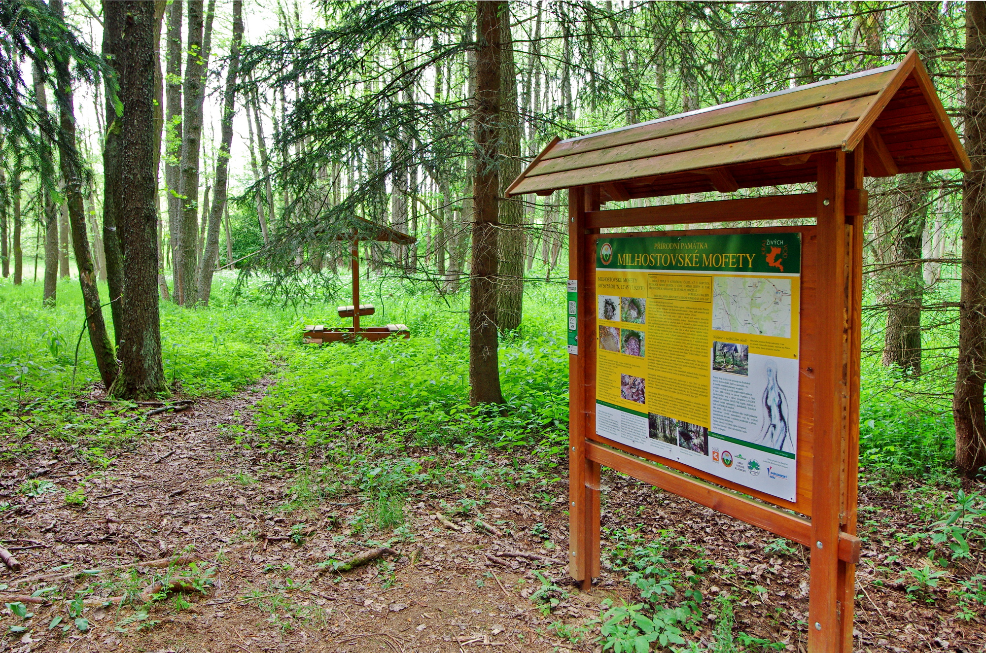 Přírodní památka Milhostovské mofety, okres Cheb